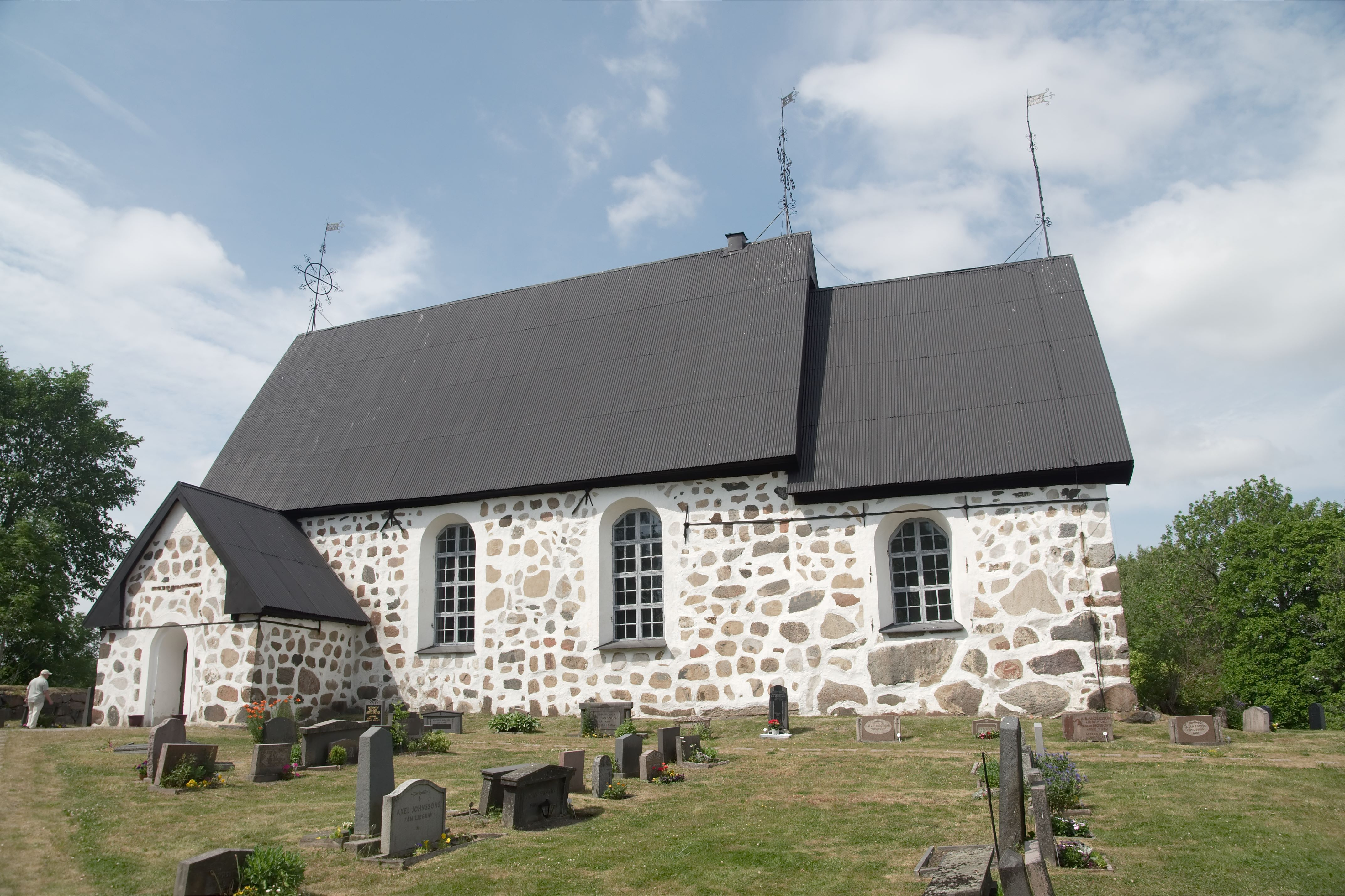 Cloudberry fotosafari